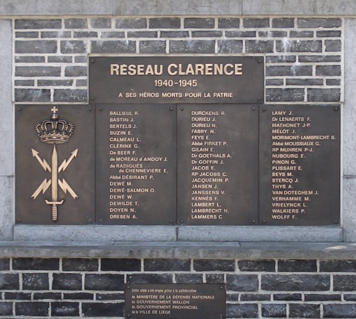 La chartreuse à Liège, stèle commémorative du réseau Clarence (1940-1944)